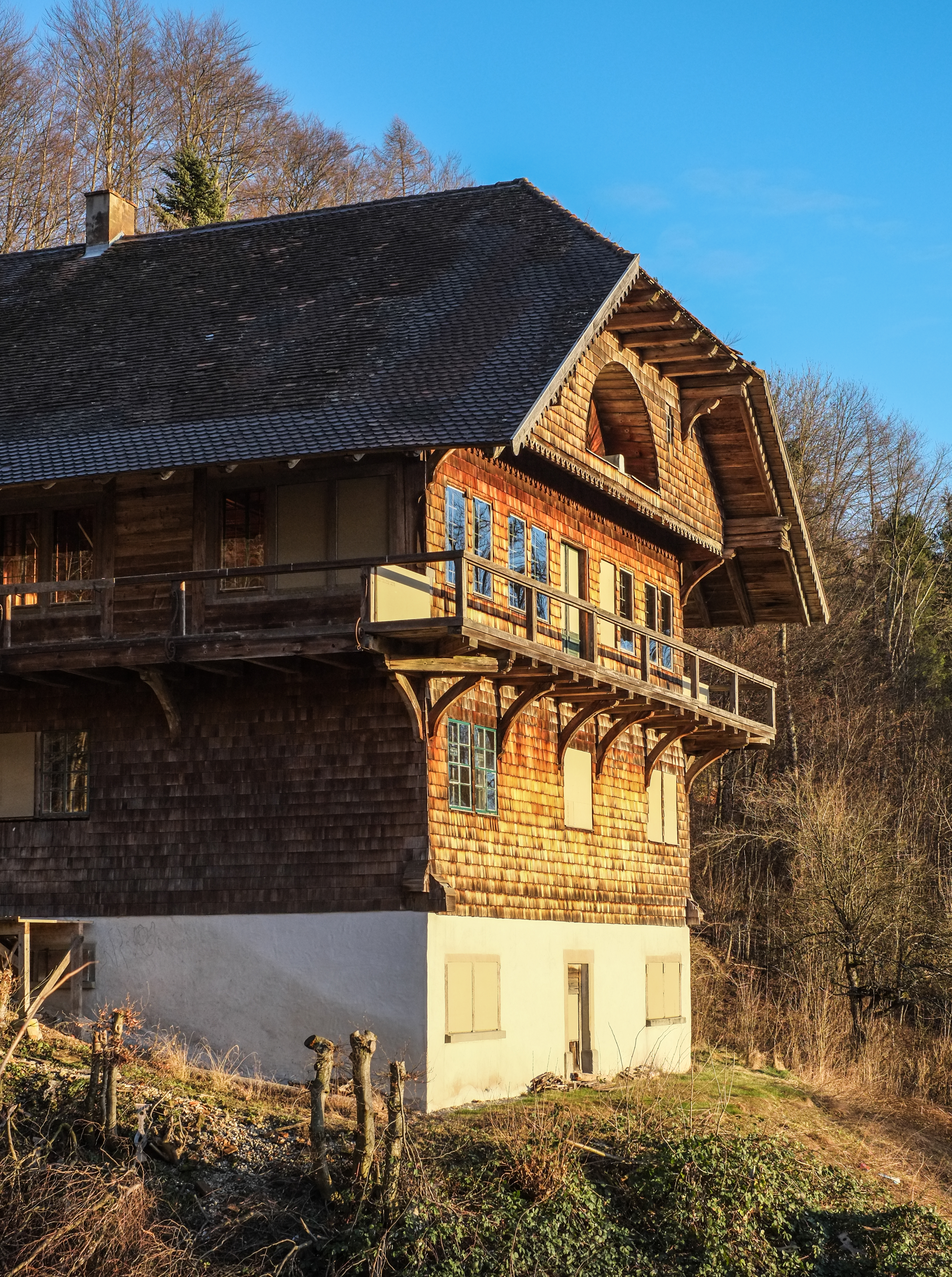 Schweizerhaus in Heiligenberg, ehemalige herrschaftliche Sennerei